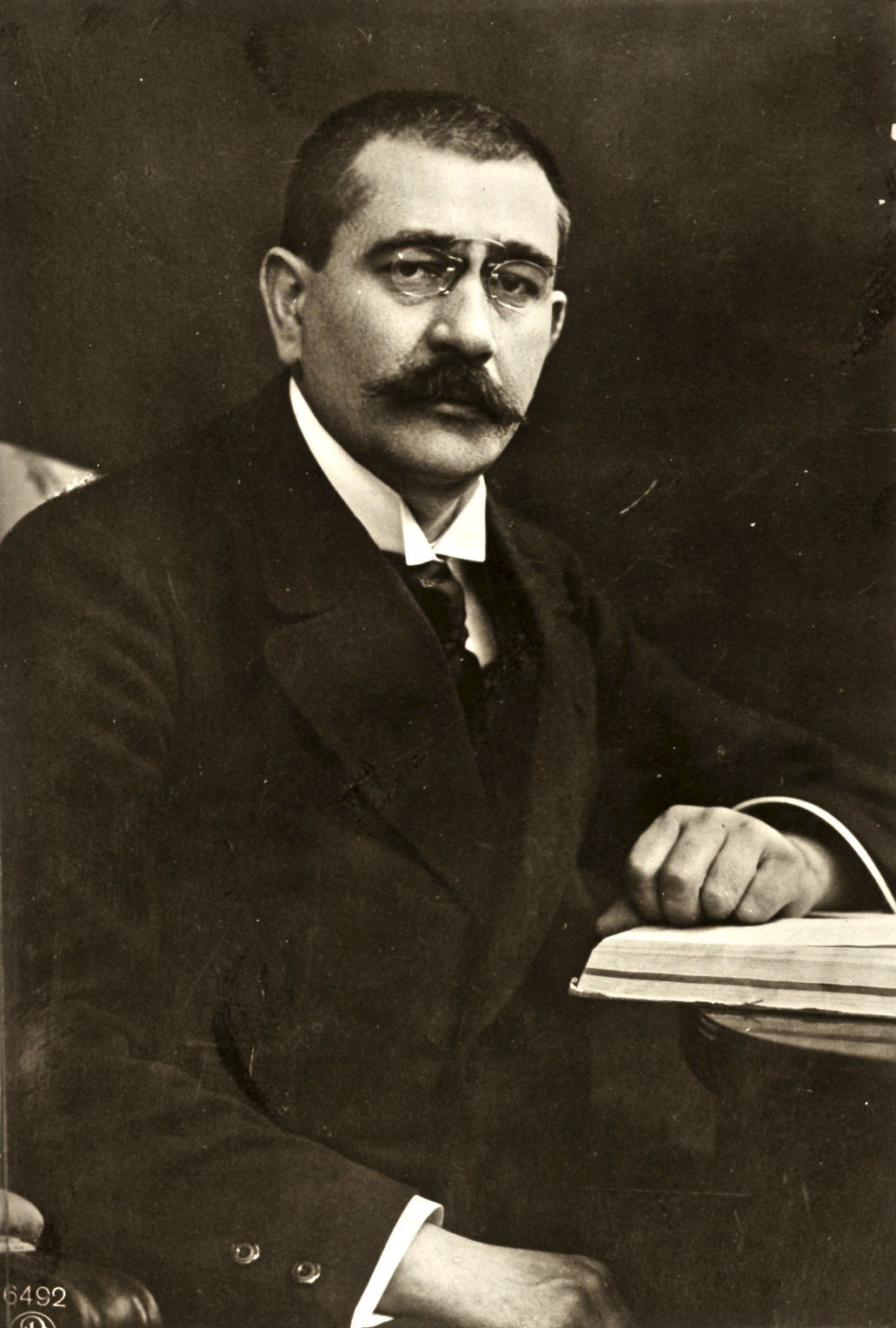 Gustav Noske (1868–1946), Minister während der Weimarer Republik